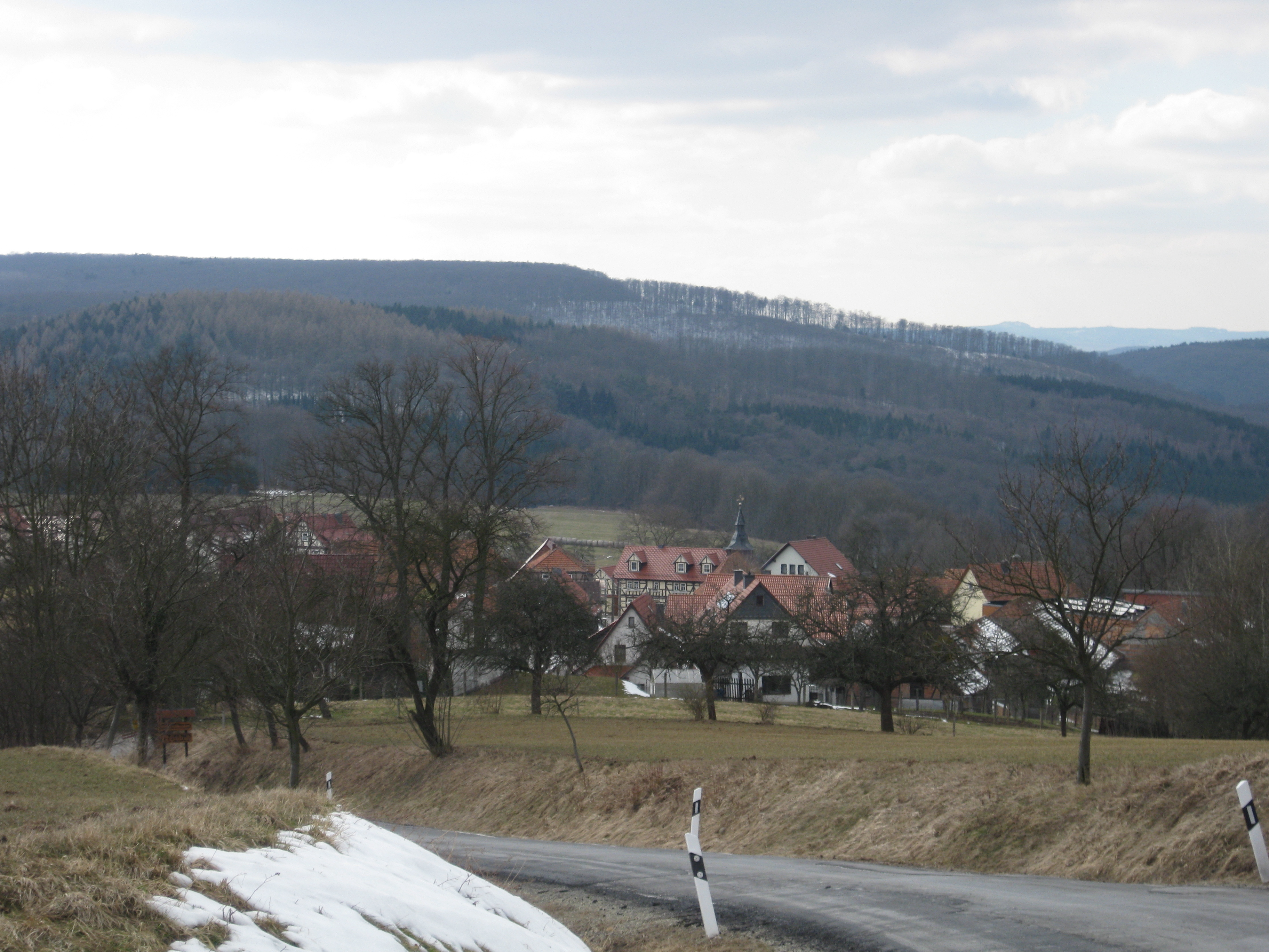 Eichstruth aus Richtung Nordost gesehen (dahinter der Brandberg und der Stein)